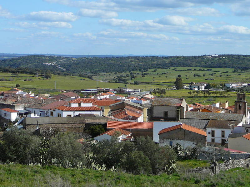 Pueblo